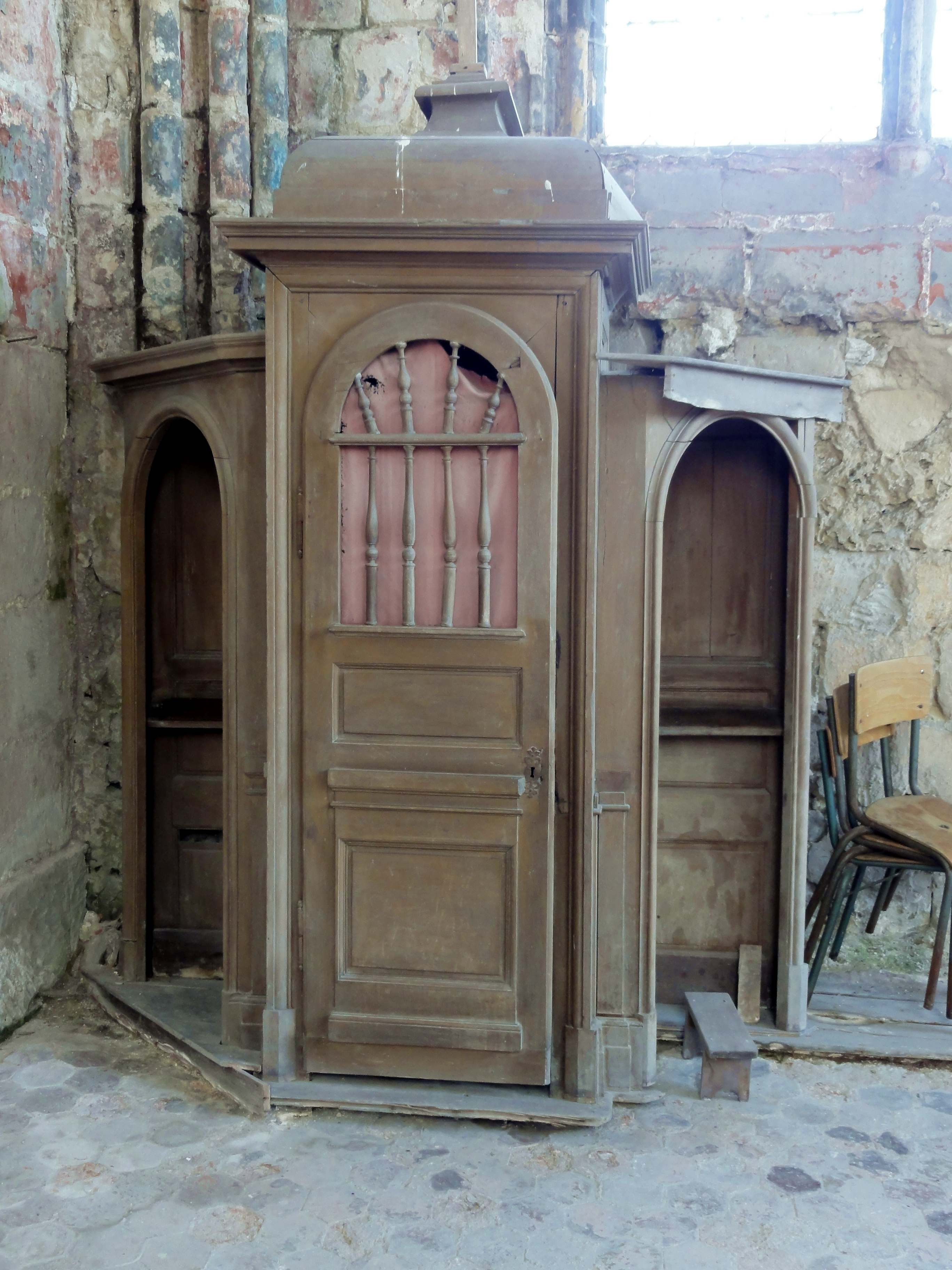 Mobilier de l'église (voir titre).